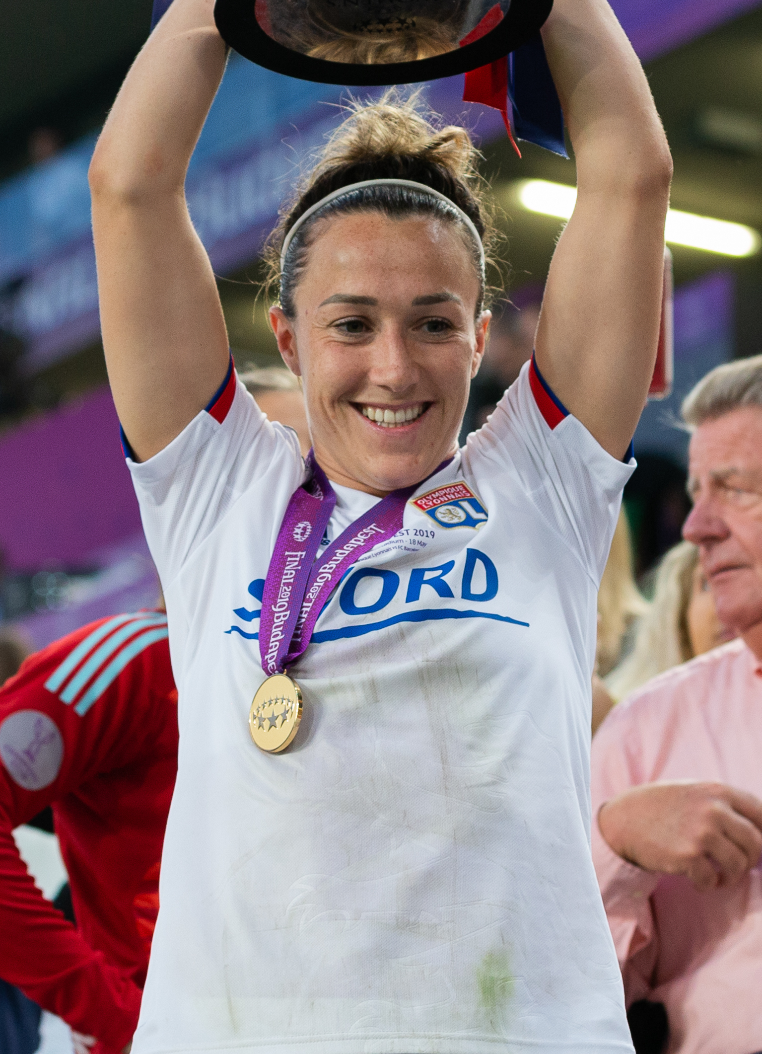 Fußball, Frauen, UEFA Women's Champions League, Olympique Lyonnais - FC Barcelona; Lucy Bronze (Olympique Lyon, 2) feiert mit dem Pokal; Jubel, celebration